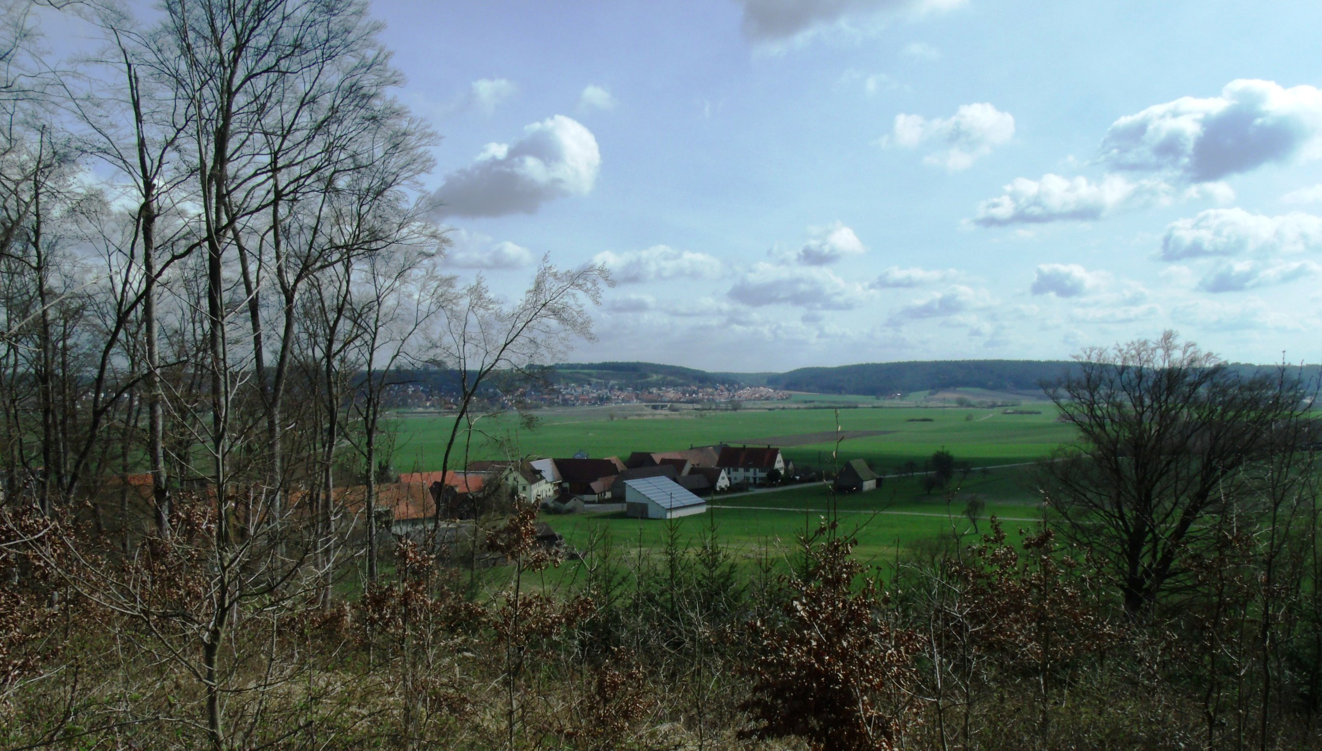 Hürbel am Rangen, Ortsteil von Lehrberg im mittelfränkischen Landkreis Ansbach, gegen Lehrberg gesehen